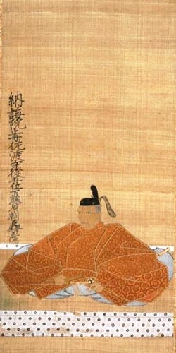 江戸時代初期の大名・本多正信の肖像画